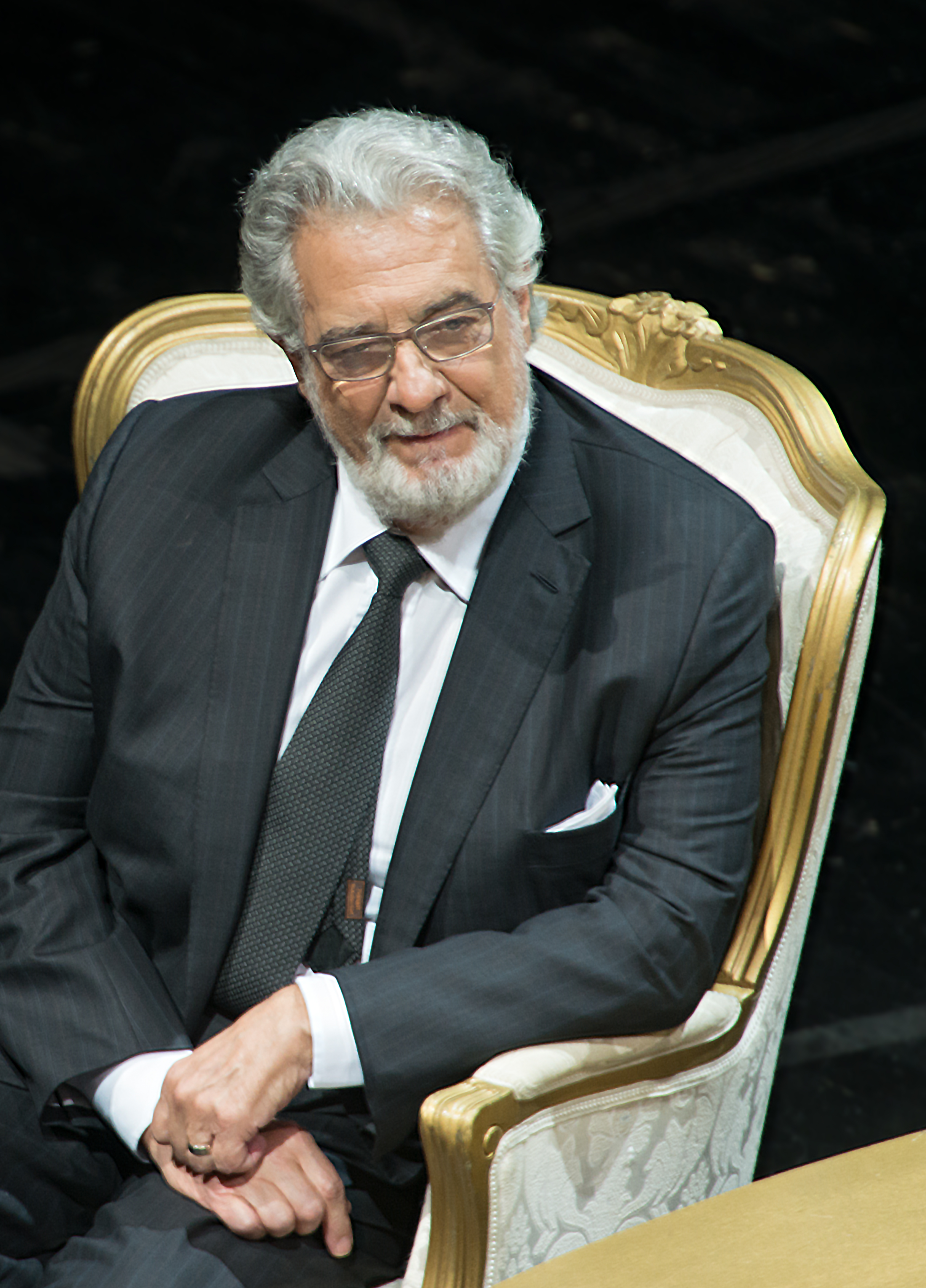 Placido Domingo bei der Preisverleihung Europa Nostra in Wien